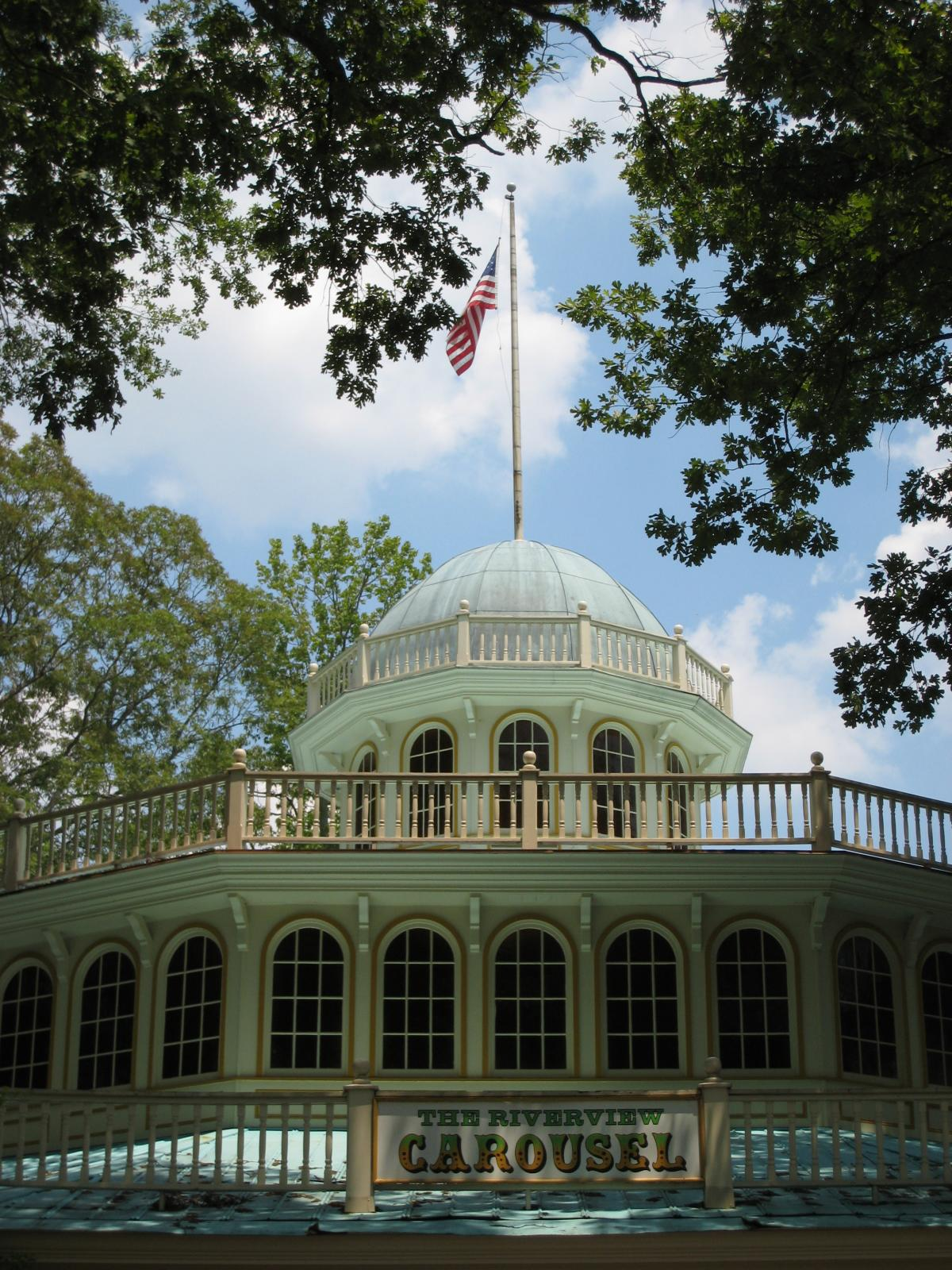 Das Riverview-Karussell im Vergnügungspark Six Flags over Georgia bei Atlanta.